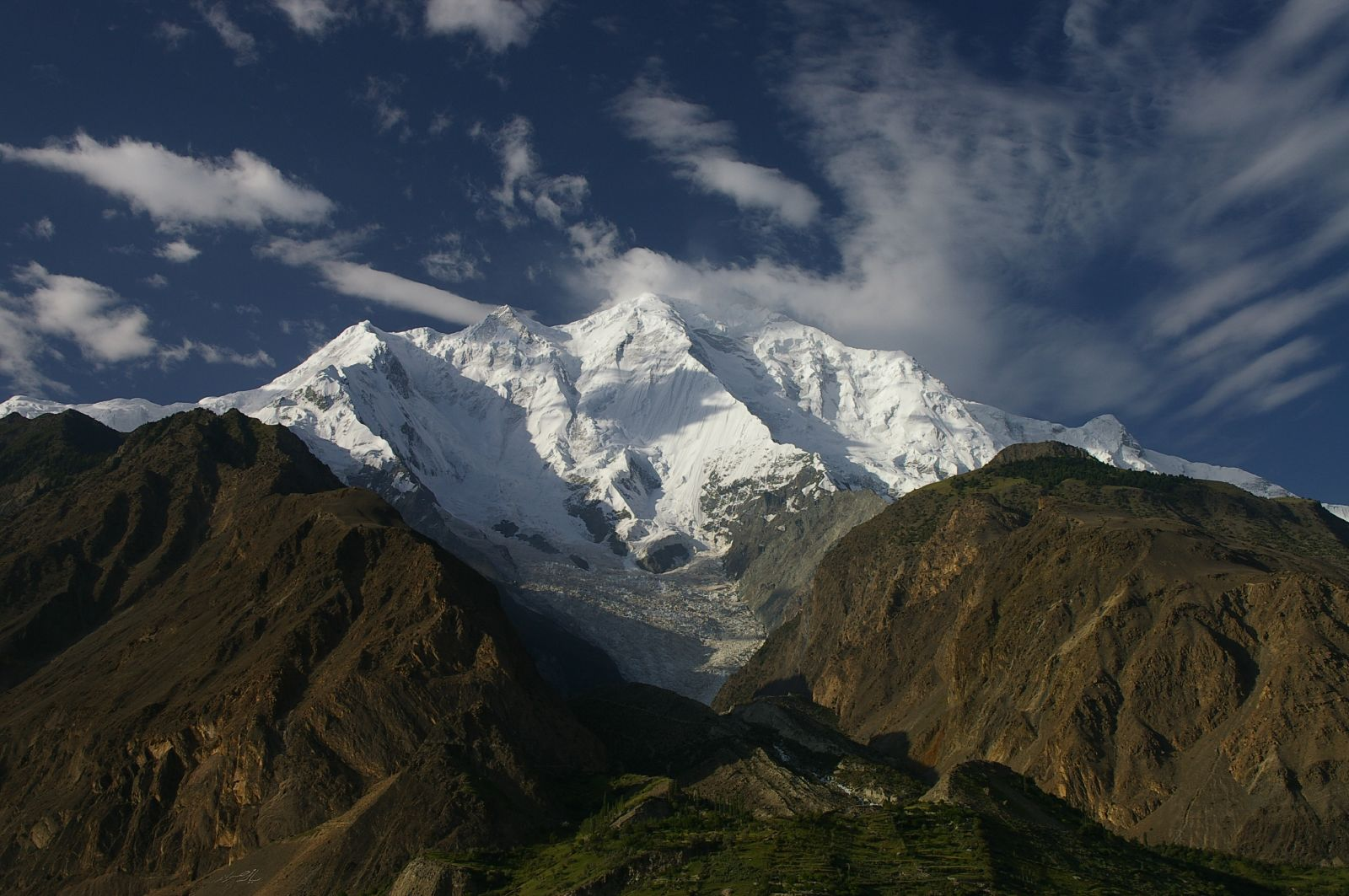 Mount Rakaposhi, Pakistan